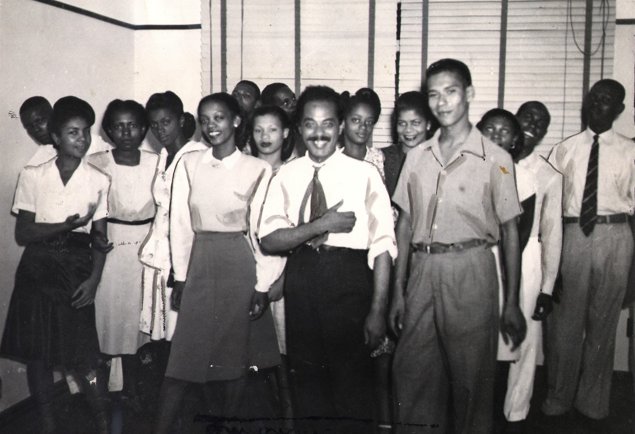 Fotografia do Fundo Correio da Manhã, sob a guarda do Arquivo Nacional.